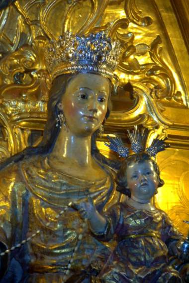 Nuestra Señora de Europa. Iglesia de San Martín. Sevilla.1705